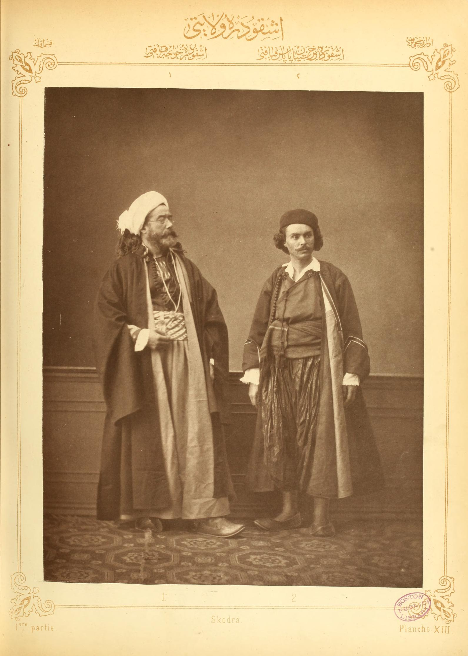 VILAYET DE PRISREN ET SKODRA PLANCHE XIII: Hodja de Skodra Prêtre chrétien de Skodra